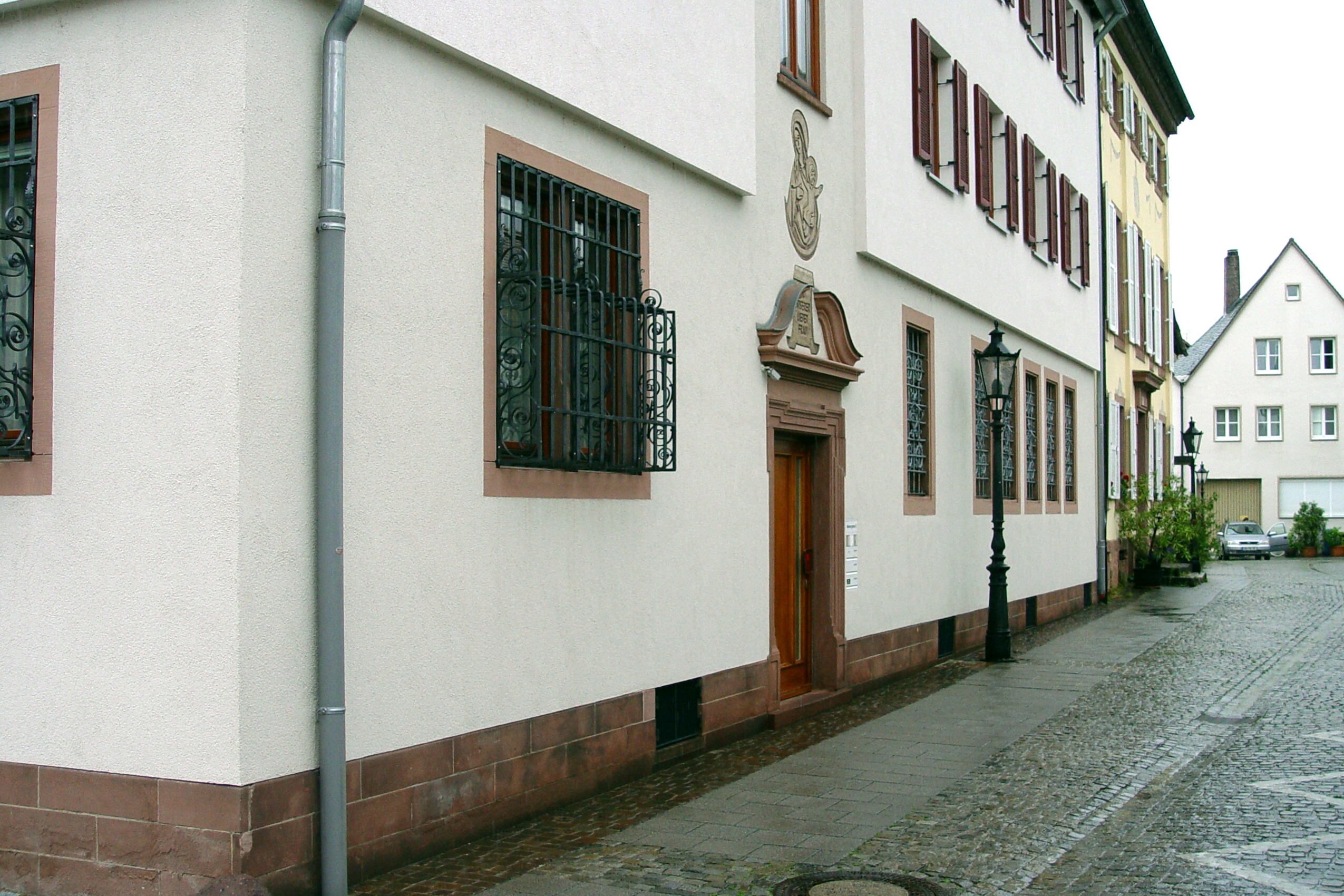 Aschaffenburg, Webergasse 6, Pfarramt zu Unserer Lieben Frau This is a photograph of an architectural monument.